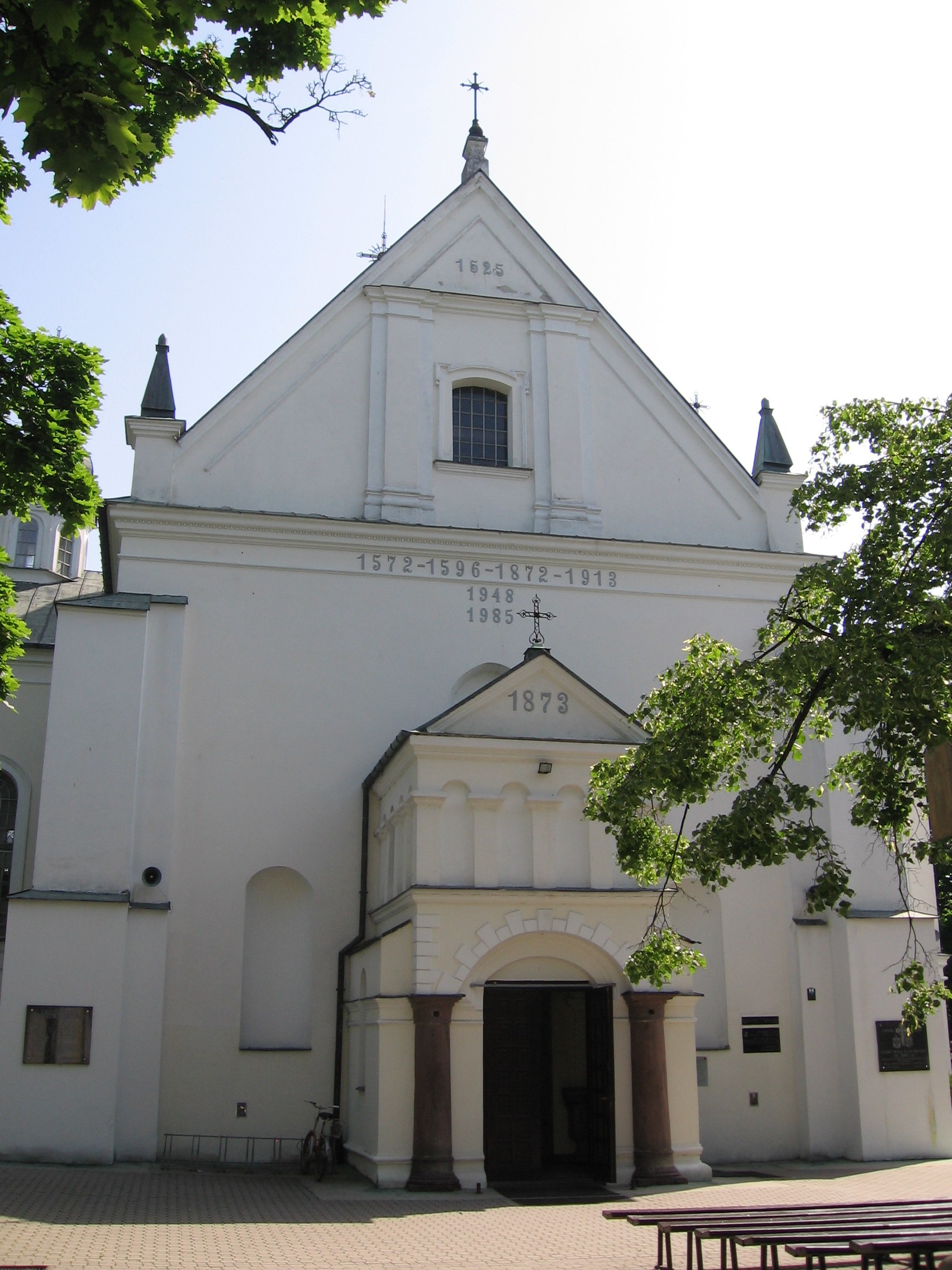 Kościół św. Anny w Białej Podlaskiej 08.1956.